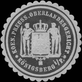 Siegelmarke des Oberlandesgerichts Königsberg vor 1918